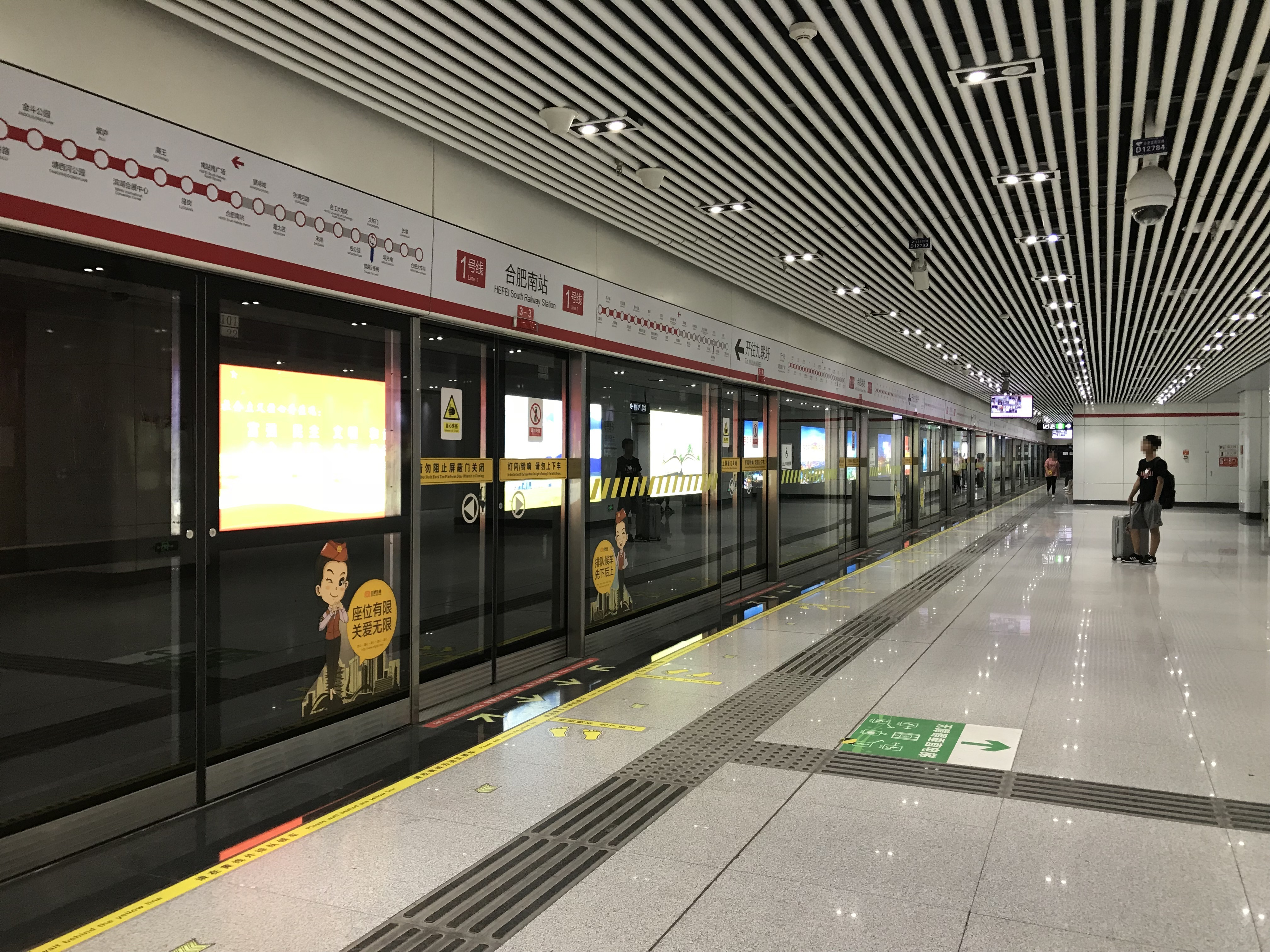 合肥南駅駅(合肥地下鉄1号線)のホーム